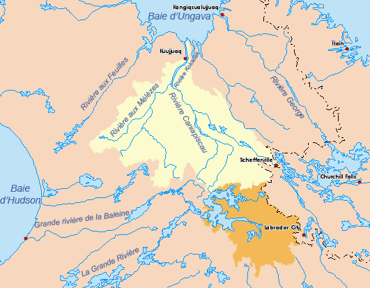 Bassin versant (jaune) de la Rivière Koksoak (Québec, Canada). Bassin détourné de la Rivière Caniapiscau vers la Grande Rivière en orange.